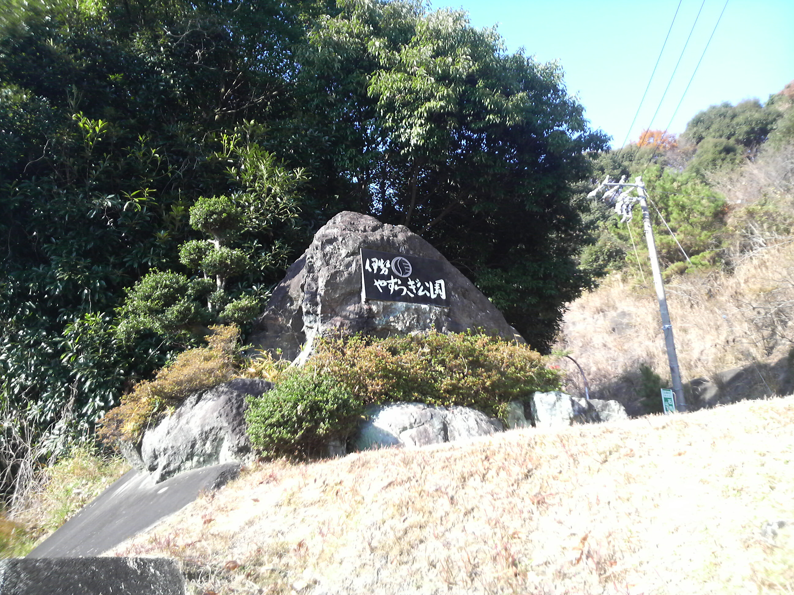 伊勢やすらぎ公園の入口にある石碑の画像